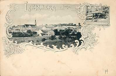 catégorie:Image de Lemberg